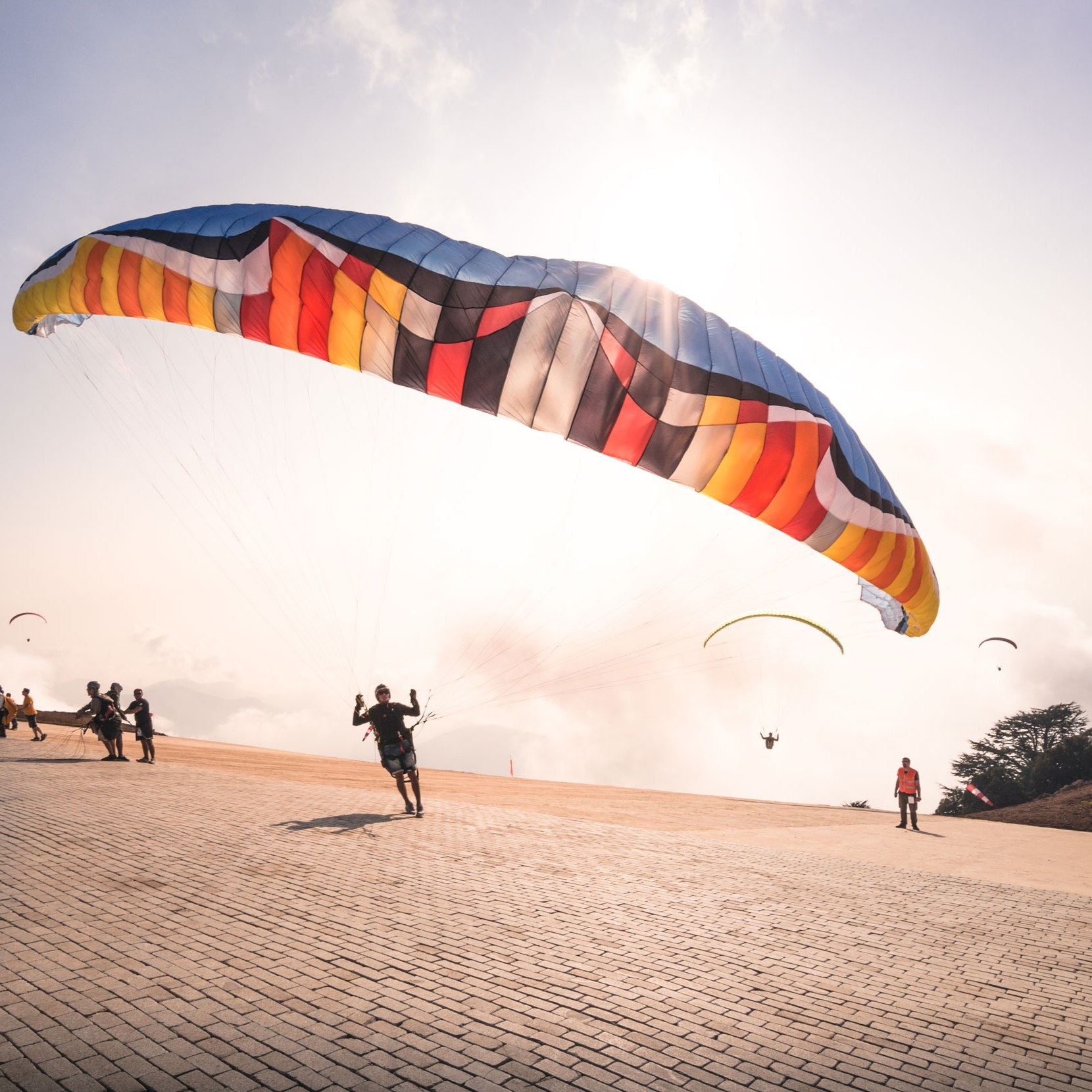 پاراگلایدر